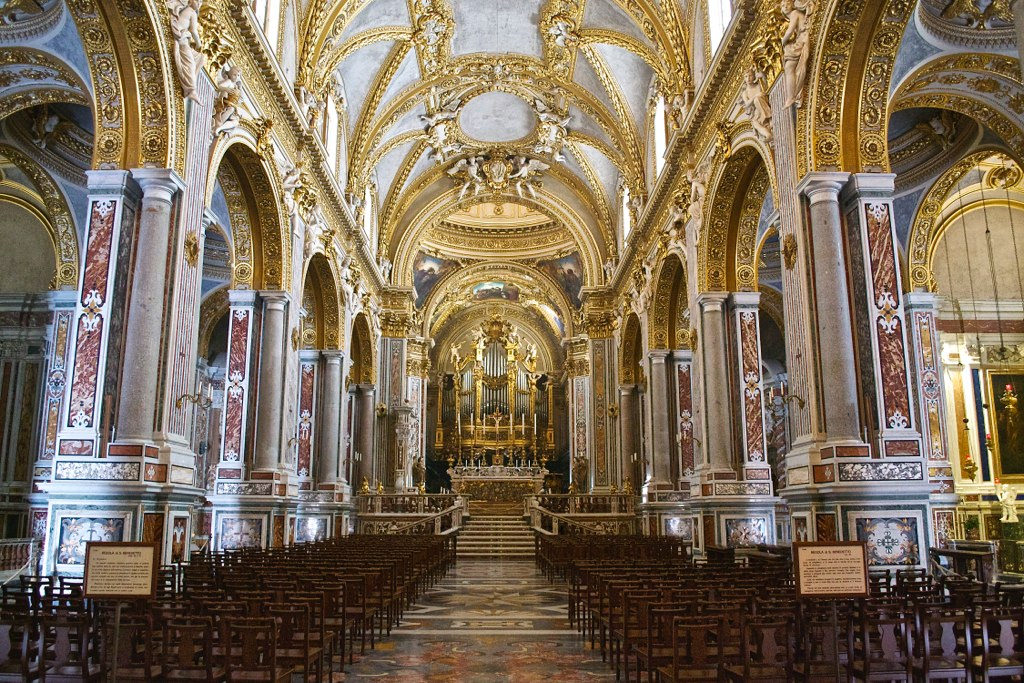 Interno dell'Abbazia di Monte Cassino